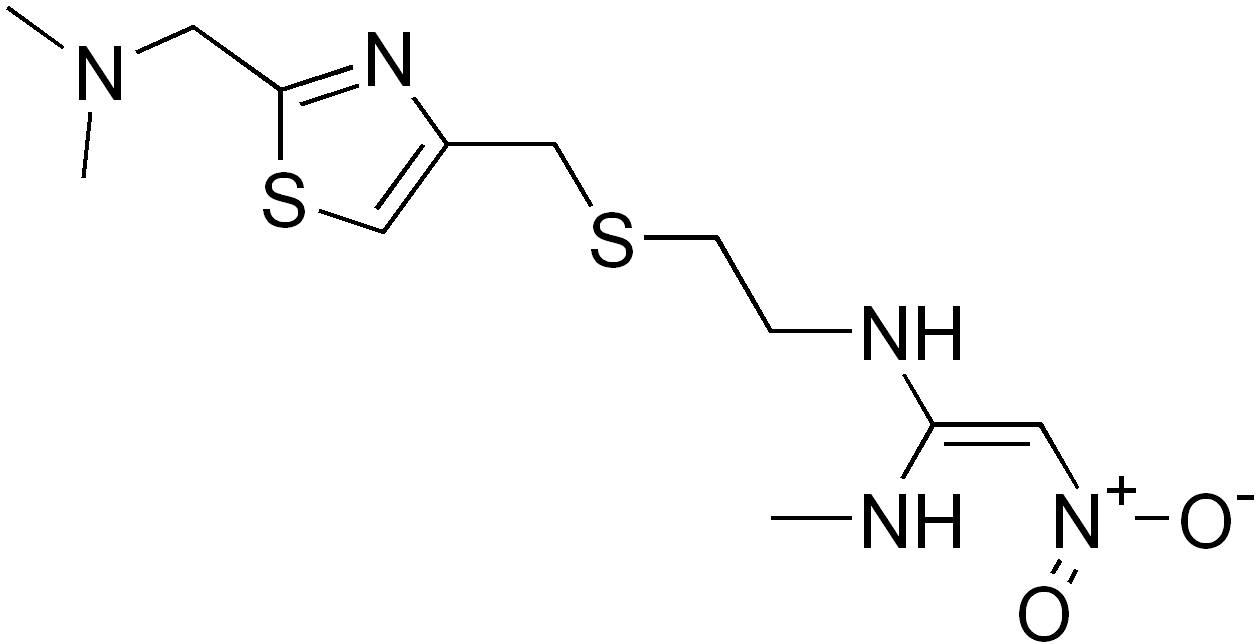 chemical structure of nizatidine